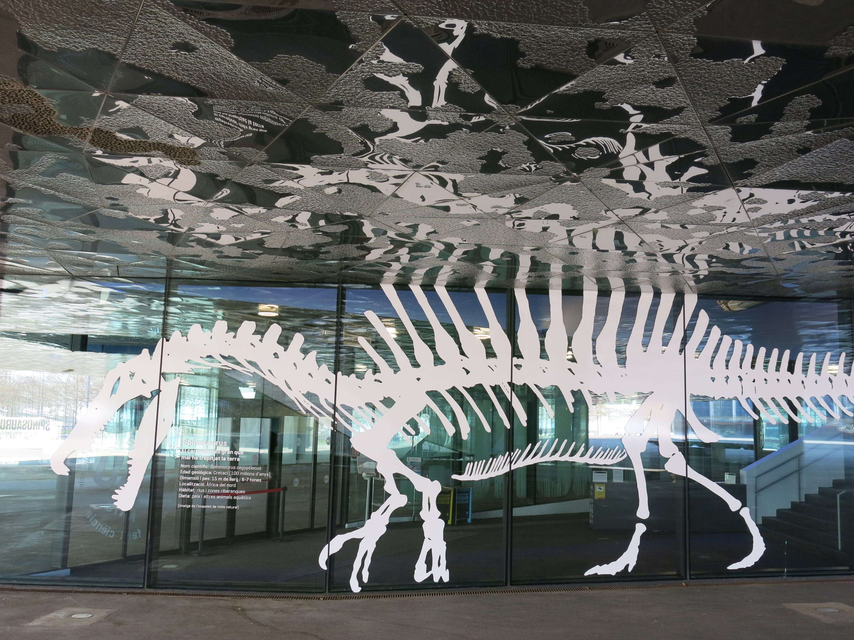 Museu Blau (Barcelona)